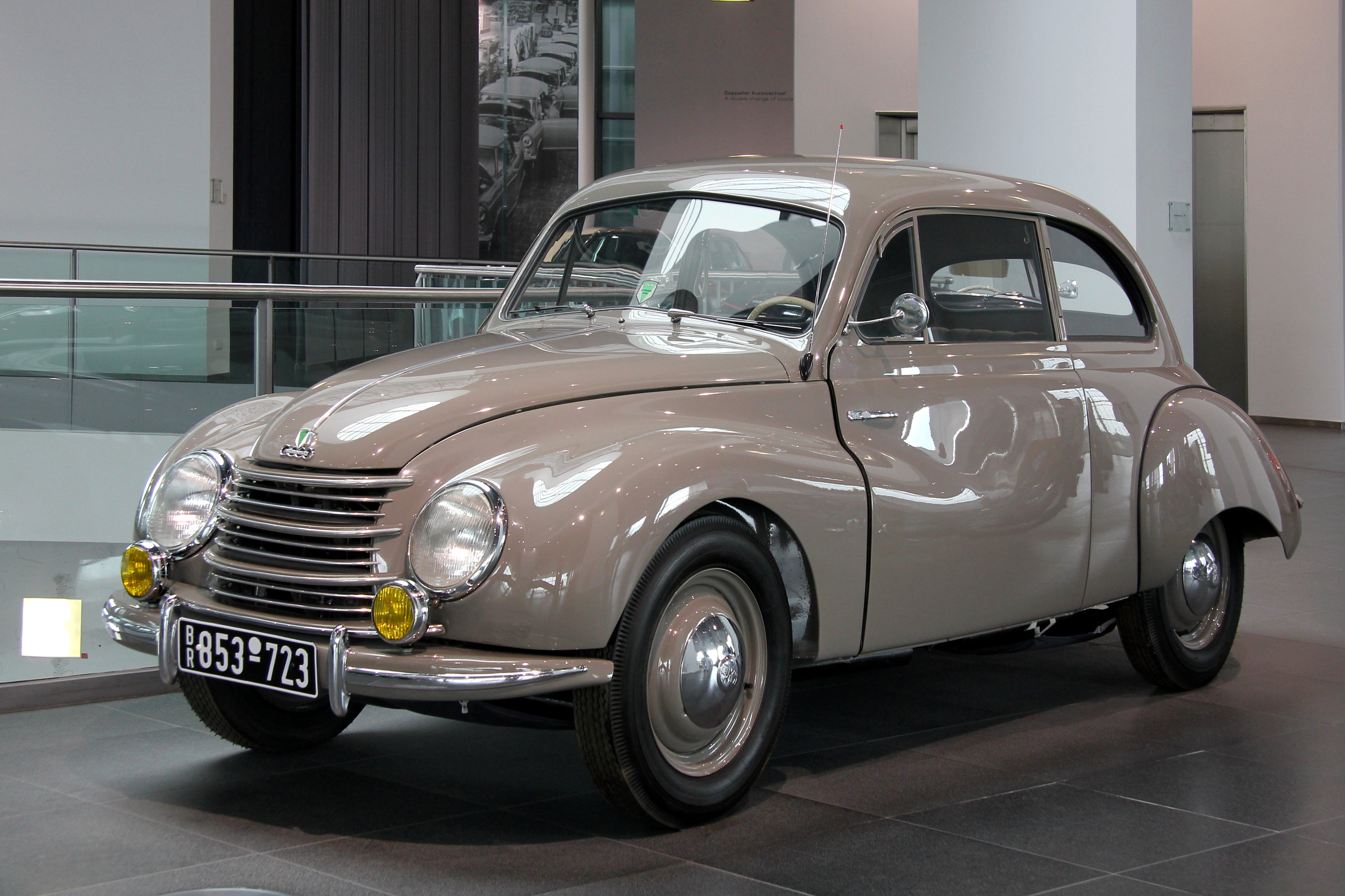 DKW F 89 „Meisterklasse“ im museum mobile in Ingolstadt. Bauzeit 1950 bis 1954. 2-Zylinder-Zweitaktmotor, 684 cm³, 23 PS. Nebellampen und Außenspiegel nicht serienmäßig. Der nachträglich eingebaute Blinker ist wegretuschiert.